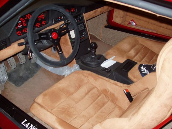 Interni di Lancia Delta s4. Foto fatta da me.